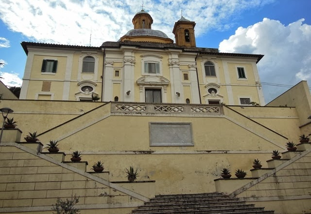 Chiesa in via del Trionfale, Roma